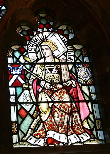 Isabela Nevillová